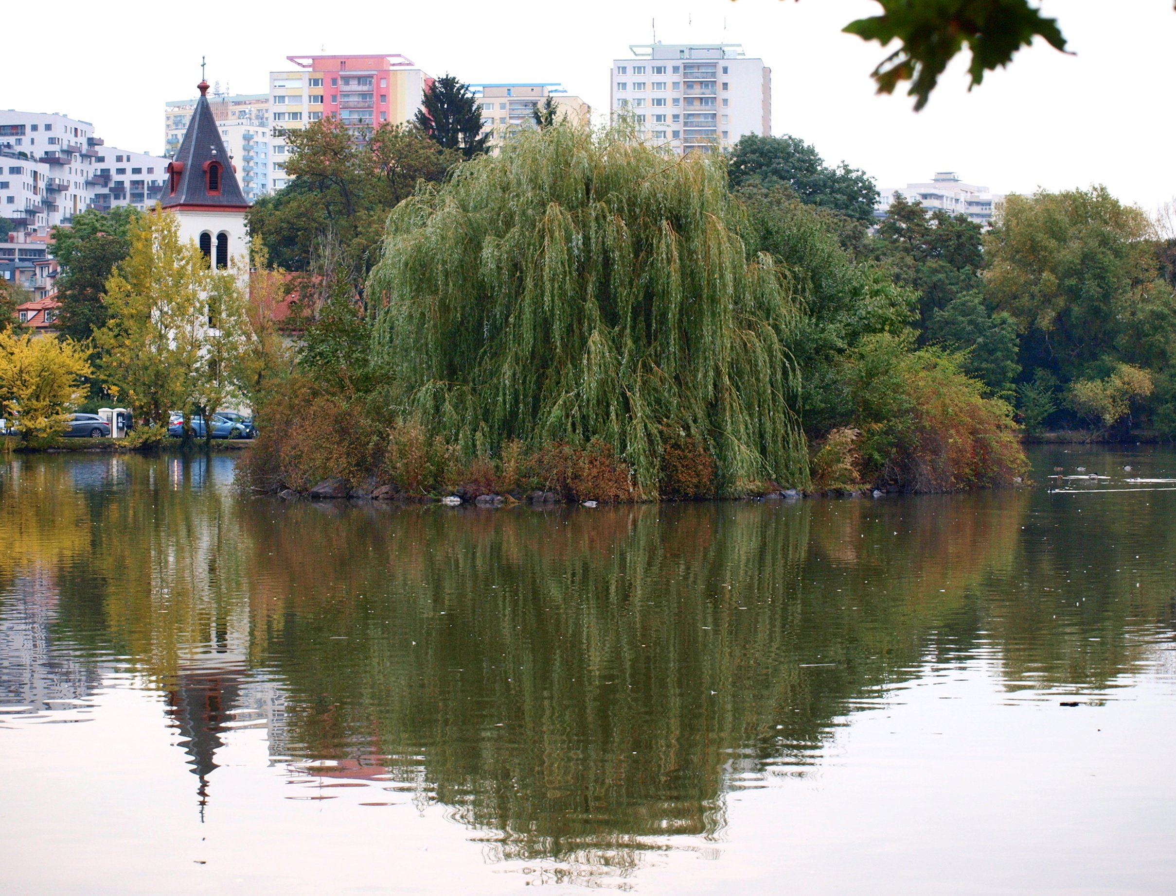 Praha 10-Záběhlice, Hamr a kostel Narození P. Marie